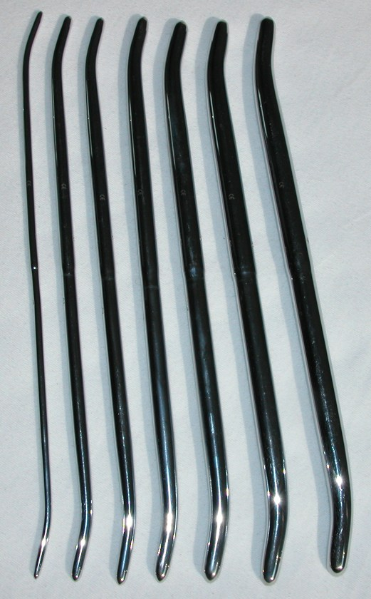 Pratt type dilatators